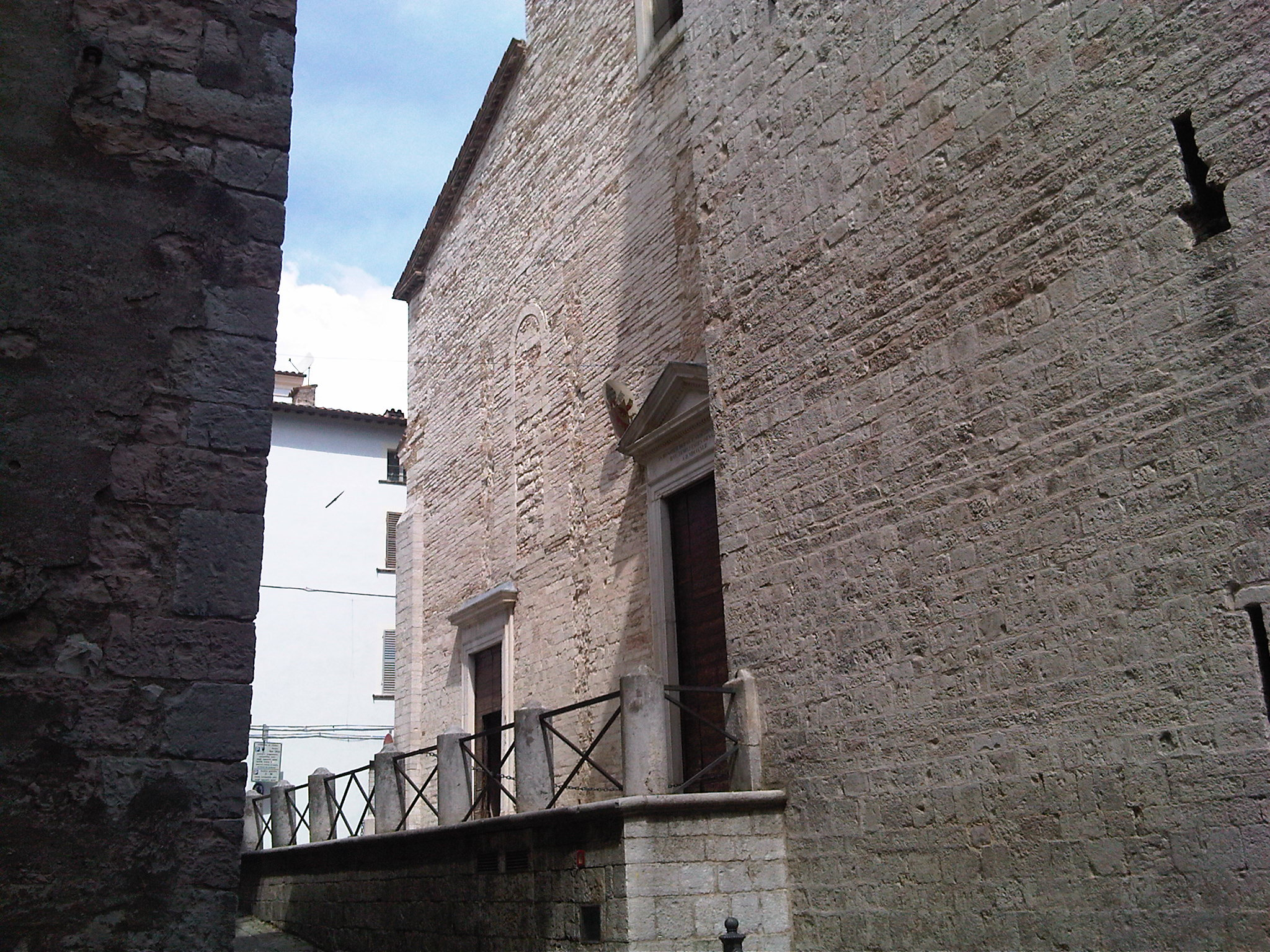 Cagli, Basilica Cattedrale, Particolare della facciata e del campanile